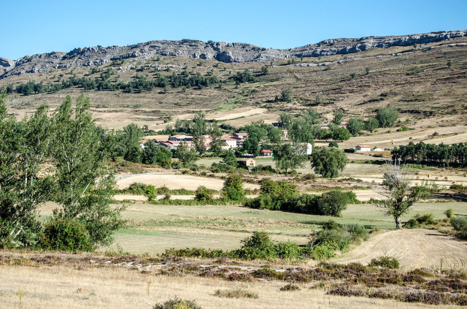 Los Valcárceres. Barrio de Santa Cruz. 2015.